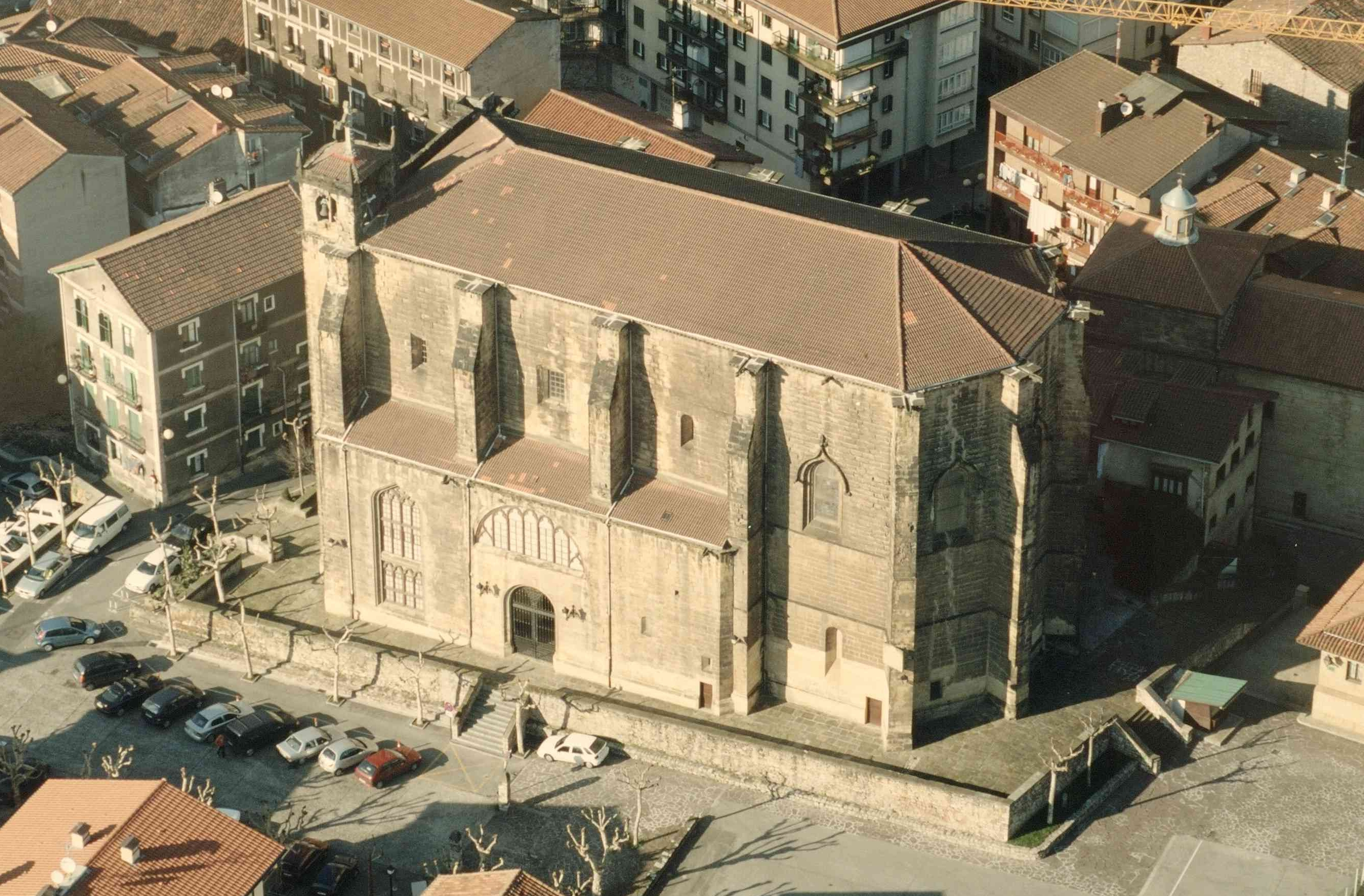 San Joan Bataiatzailearen Eliza Lezo, gipuzkoa